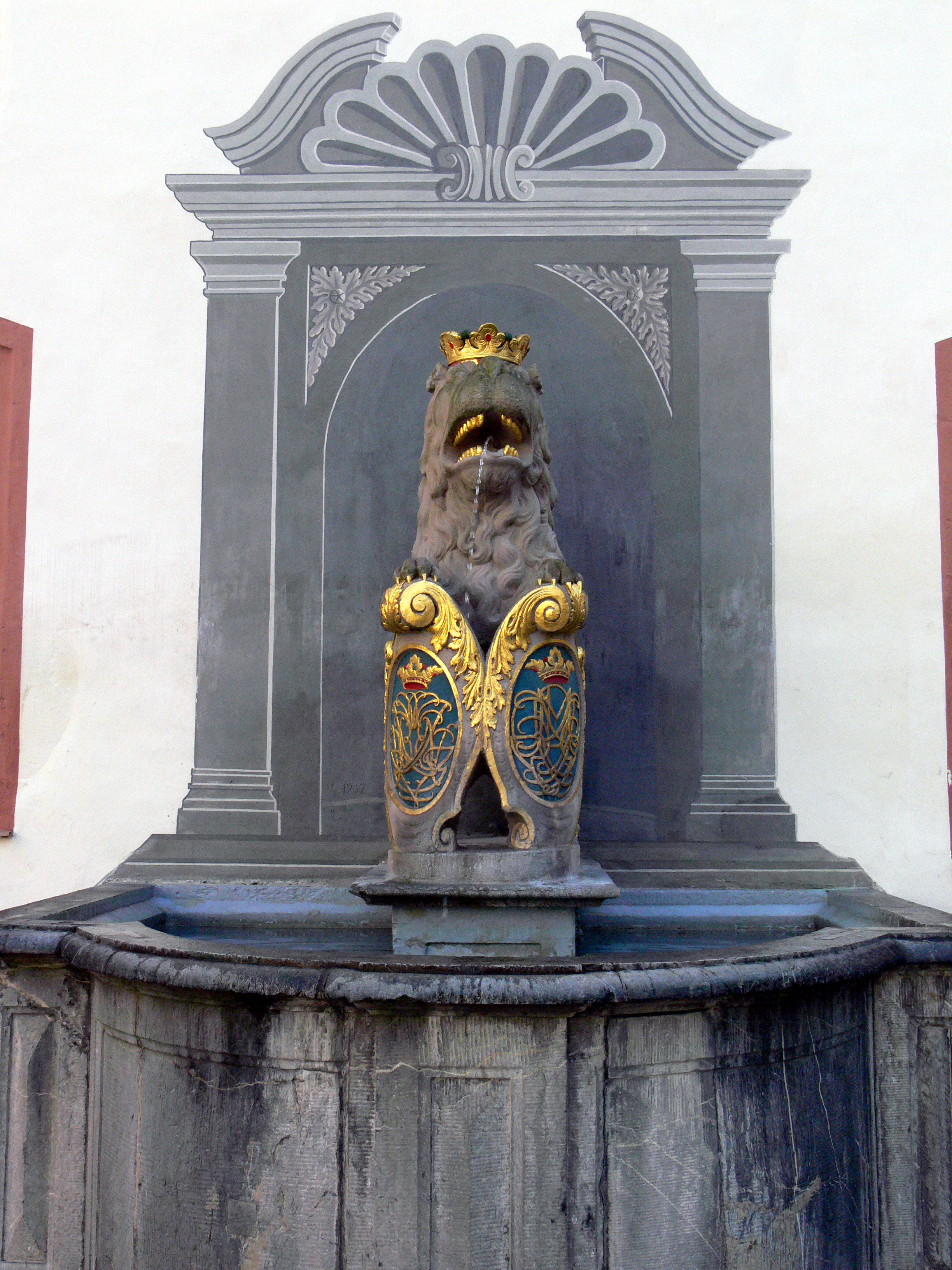 Weilburg/Lahn, Deutschland, Nassauischer Löwe im Schlosshof.